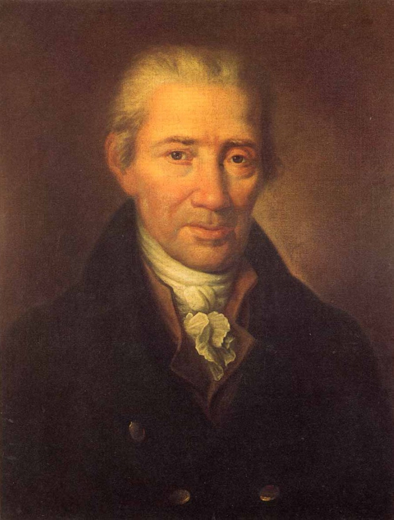 Depicted person: Johann Georg Albrechtsberger